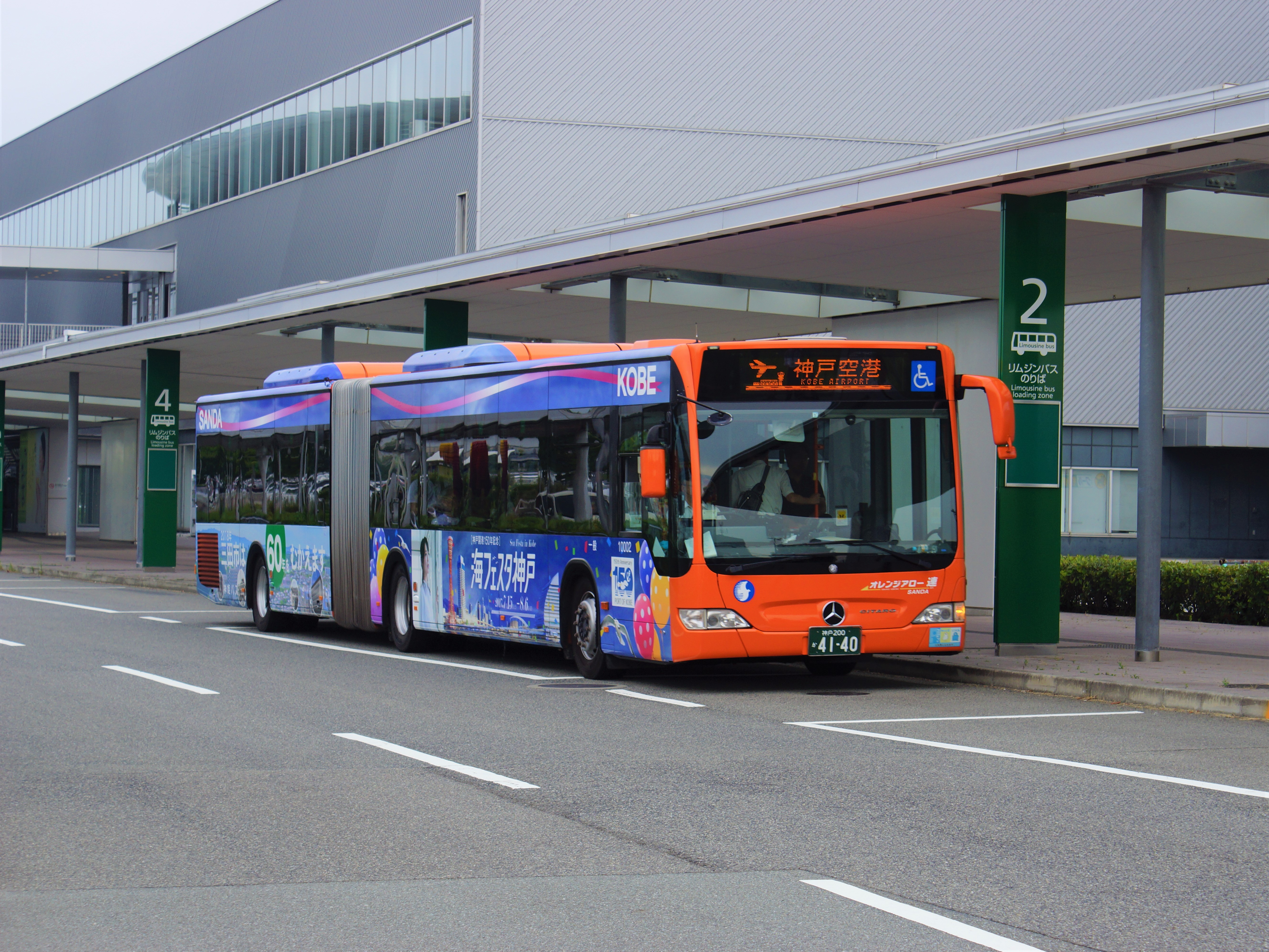 神戸空港に到着する連接バス（神姫バス）